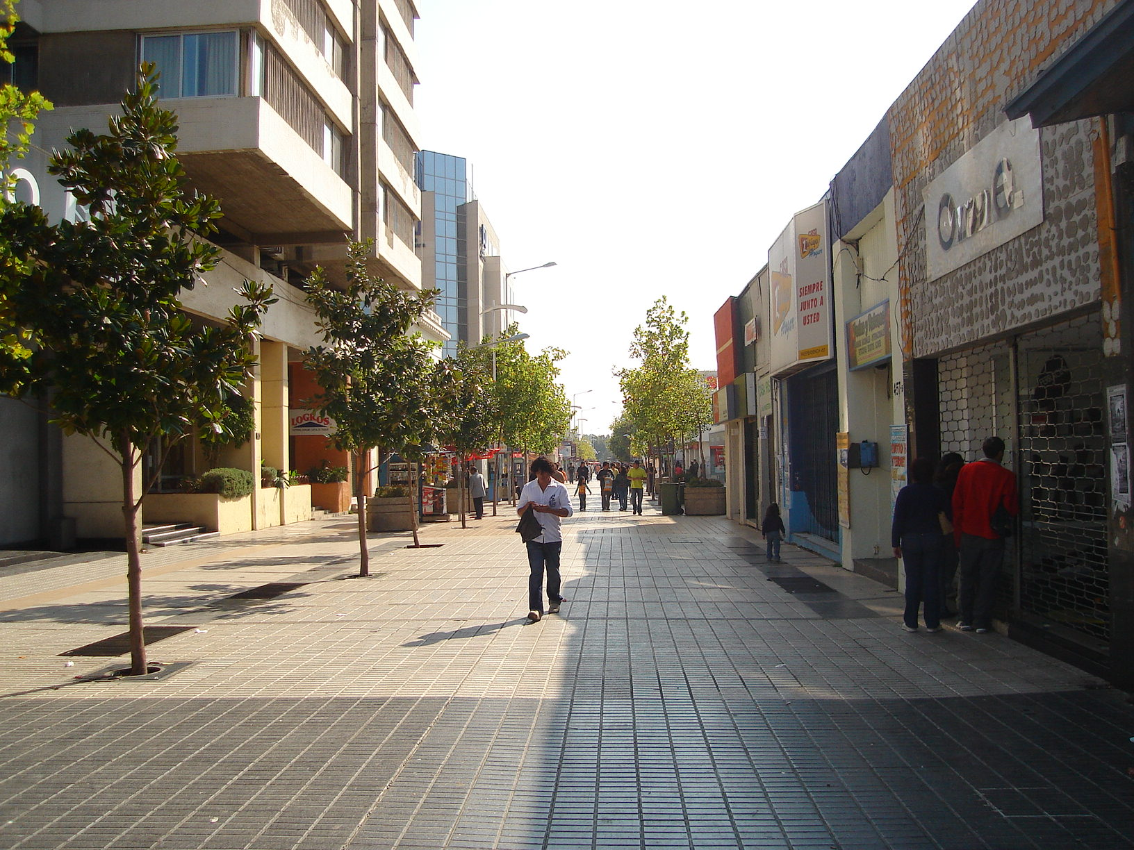 Paseo Independencia, Rancagua. Tomada por Marco Correa el 1 de abril de 2007.